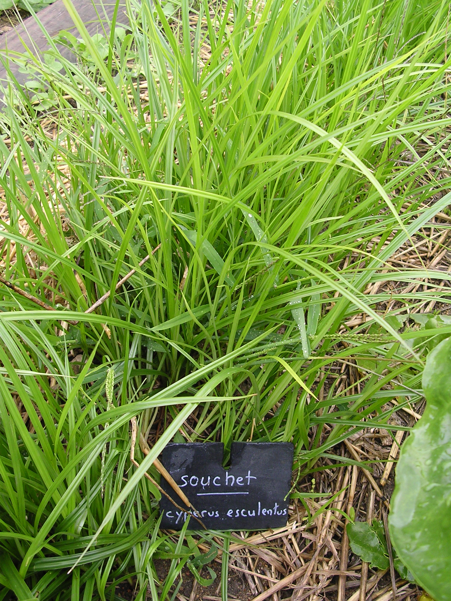 souchet